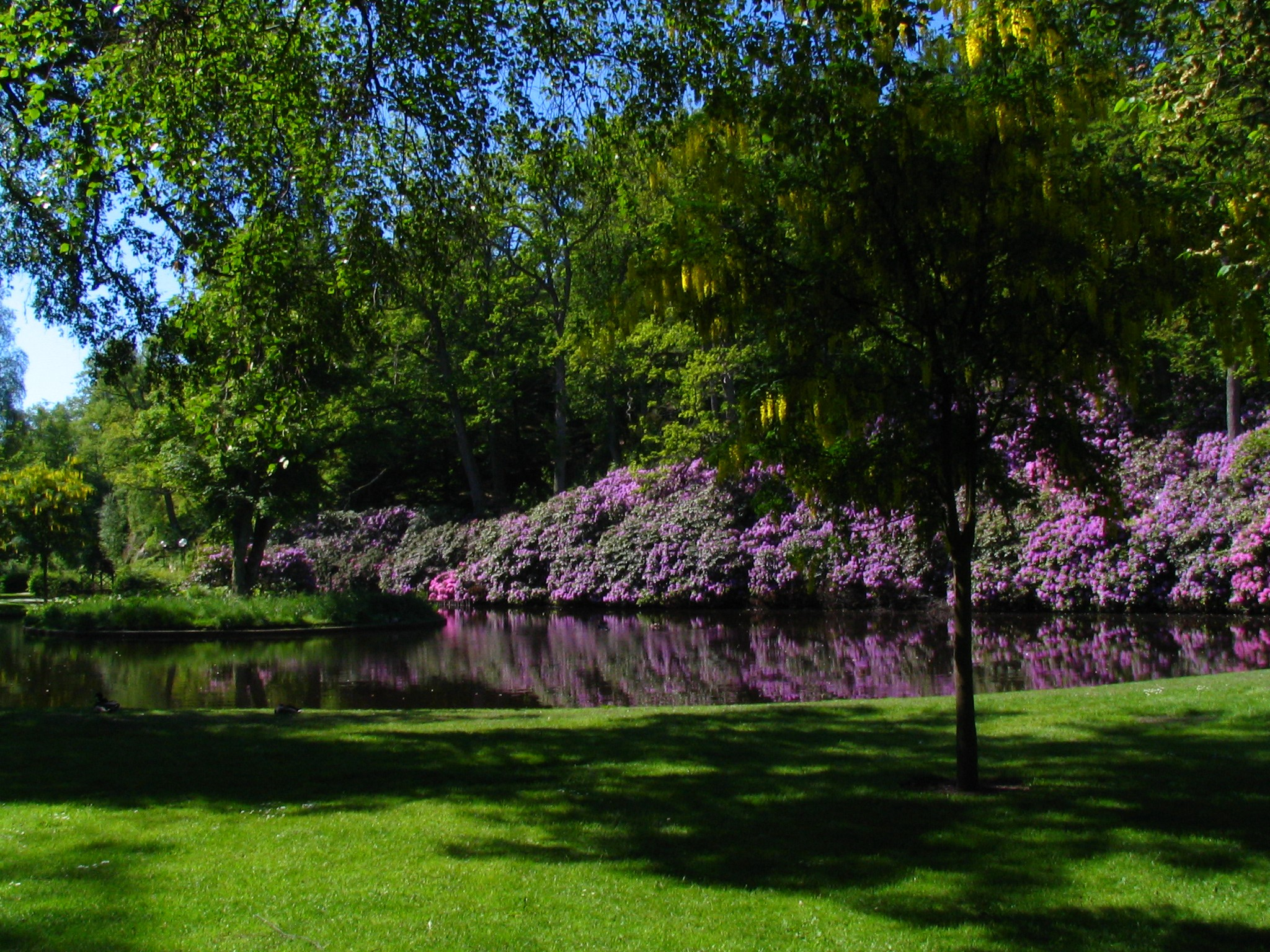 Rhododenron und See (and lake) in Brunnspark in Ronneby, Schweden (Sweden)